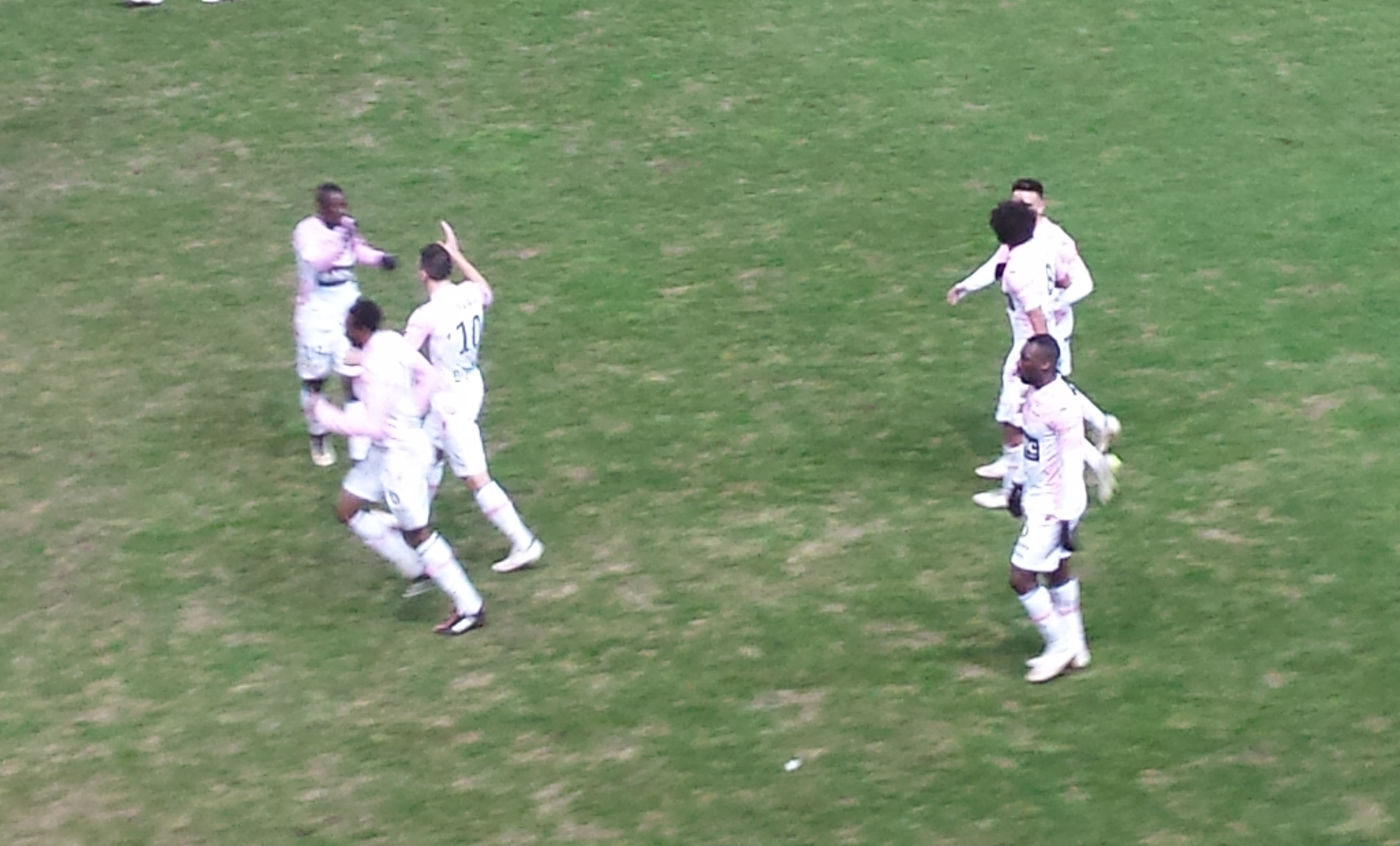 Scène de joie après le premier but de l'Evian TG lors du match Lens - Evian TG, au Stade de la Licorne, match comptant pour la vingt-cinquième journée du championnat de France de football de Ligue 1 2014-2015, le 14 février 2015.